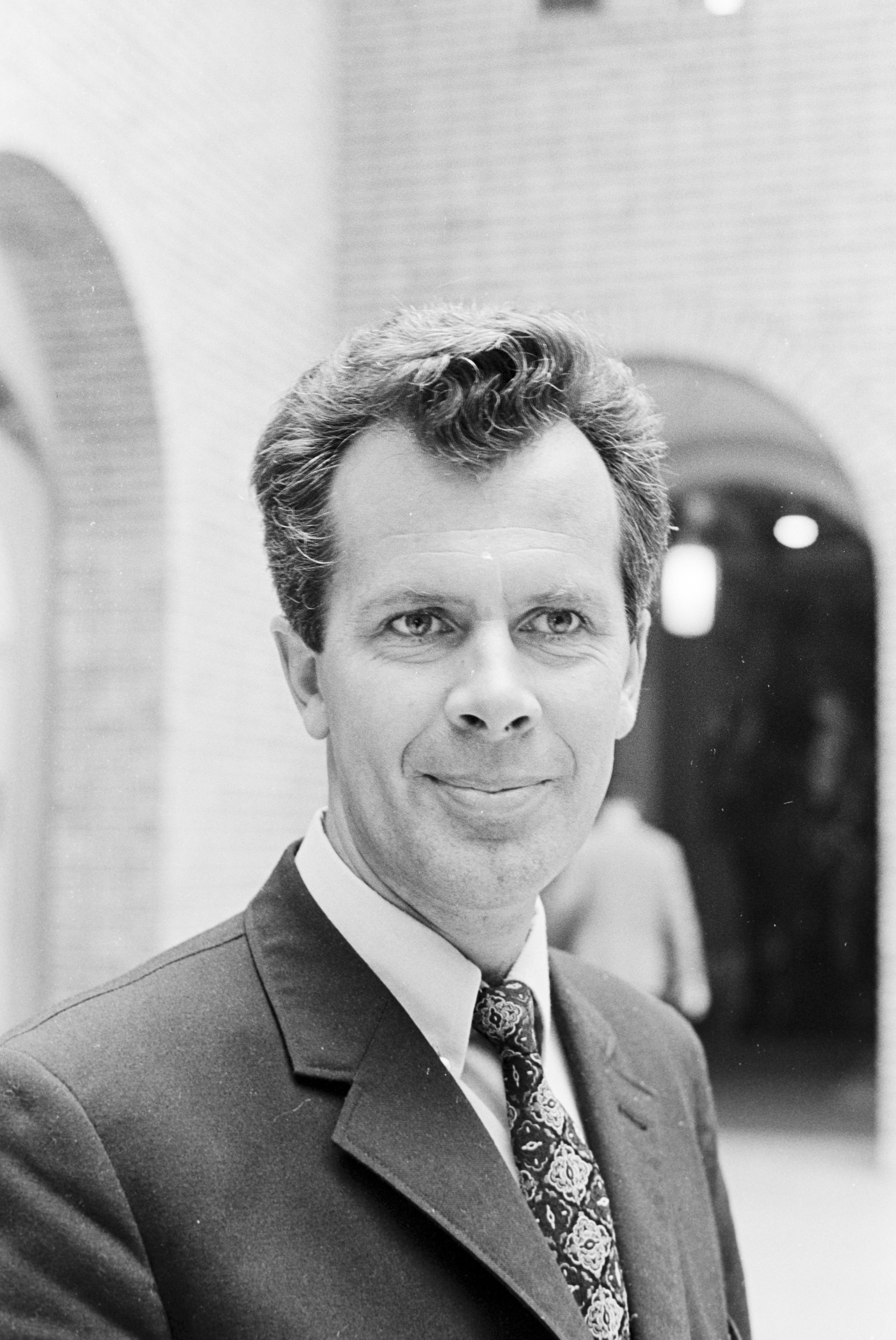 Portrett av pressemannen og politikeren Erling Johannes Norvik.